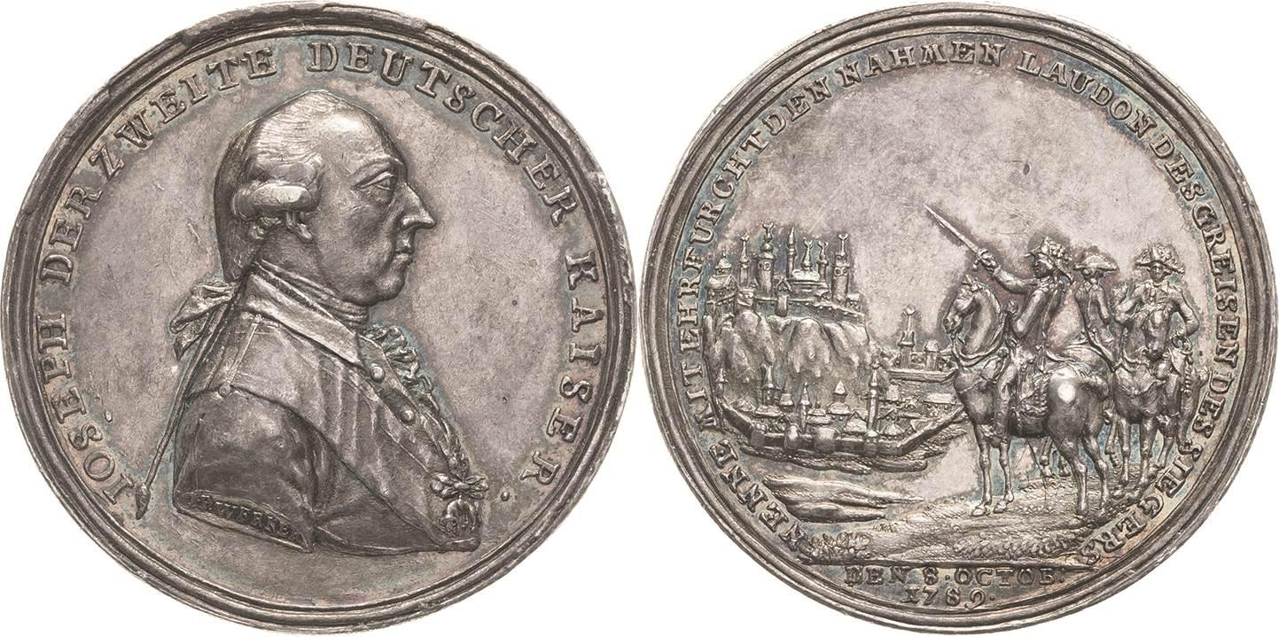 Medaille von Jeremias Paul Werner (1756–1800) auf die Einnahme Belgrads am 8. Oktober 1789. Avers: Joseph II. (Umschrift: "JOSEPH DER ZWEITE DEUTSCHER KAISER"). Revers: Der k. k. Feldmarschall Gideon Ernst von Laudon (1717–1790) deutet mit gezogenem Degen auf die Stadt (Umschrift: "NENNE MIT EHRFURCHT DEN NAHMEN LAUDON DES GREISEN, DES SIEGERS, DEN 8. OCT. 1789").